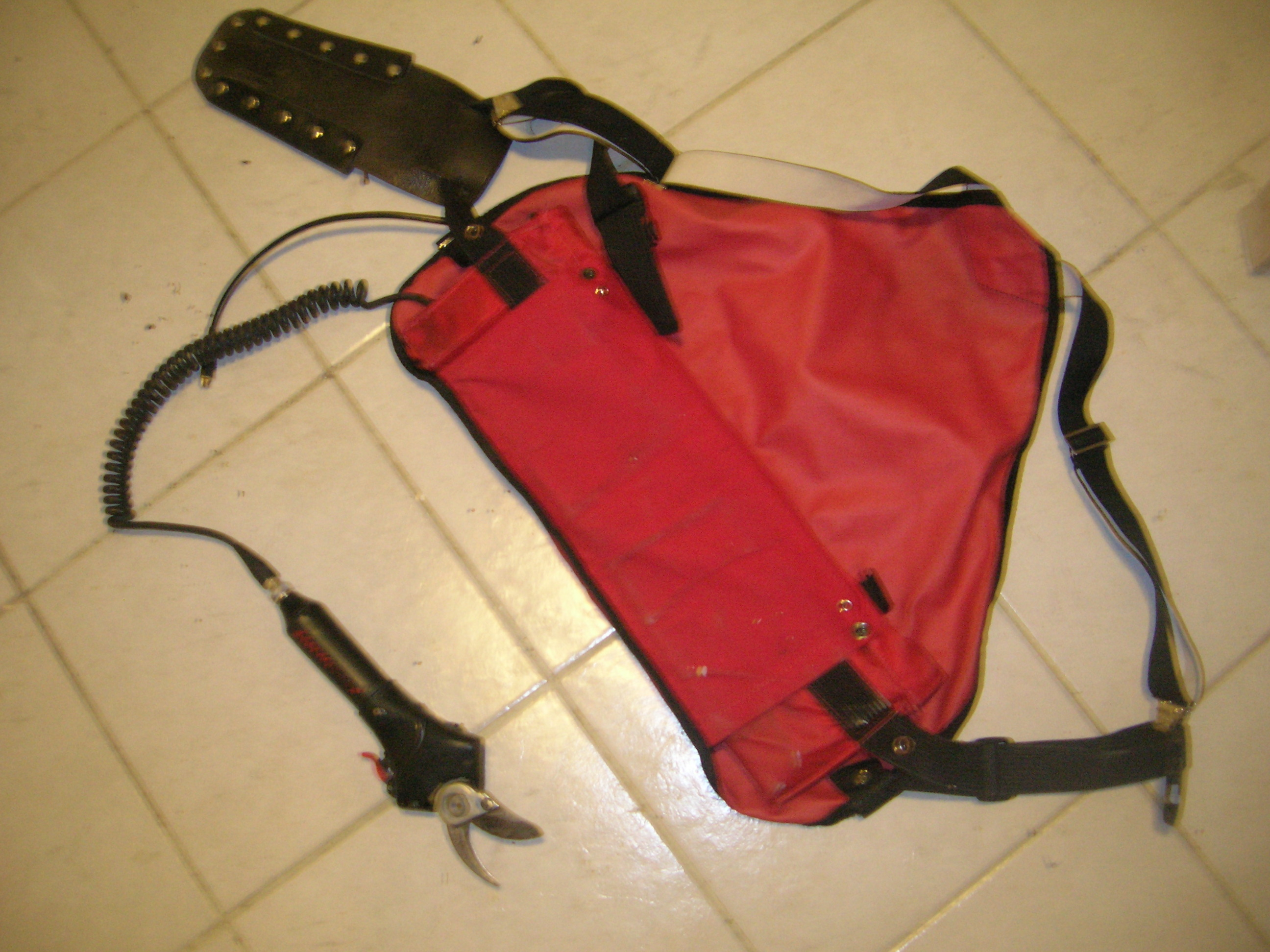 Sécateur électrique électrocoup de la société infaco. Le créateur de cette marque, Daniel Delmas, a inventé le ciseau électrique en 1984. Photo prise le 9 mars 2010 vers 10:45.